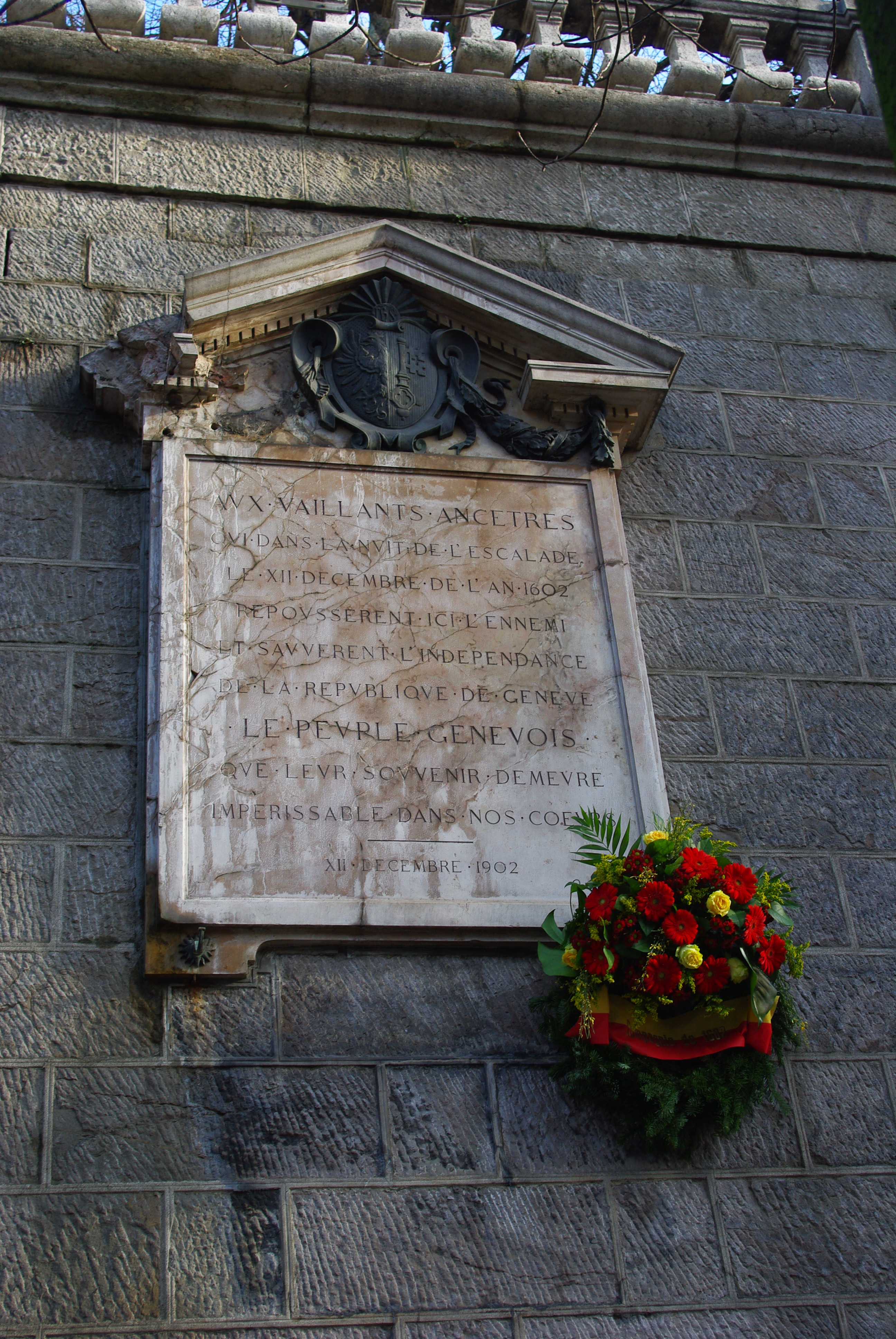 Plaque commémorative posée en 1902.